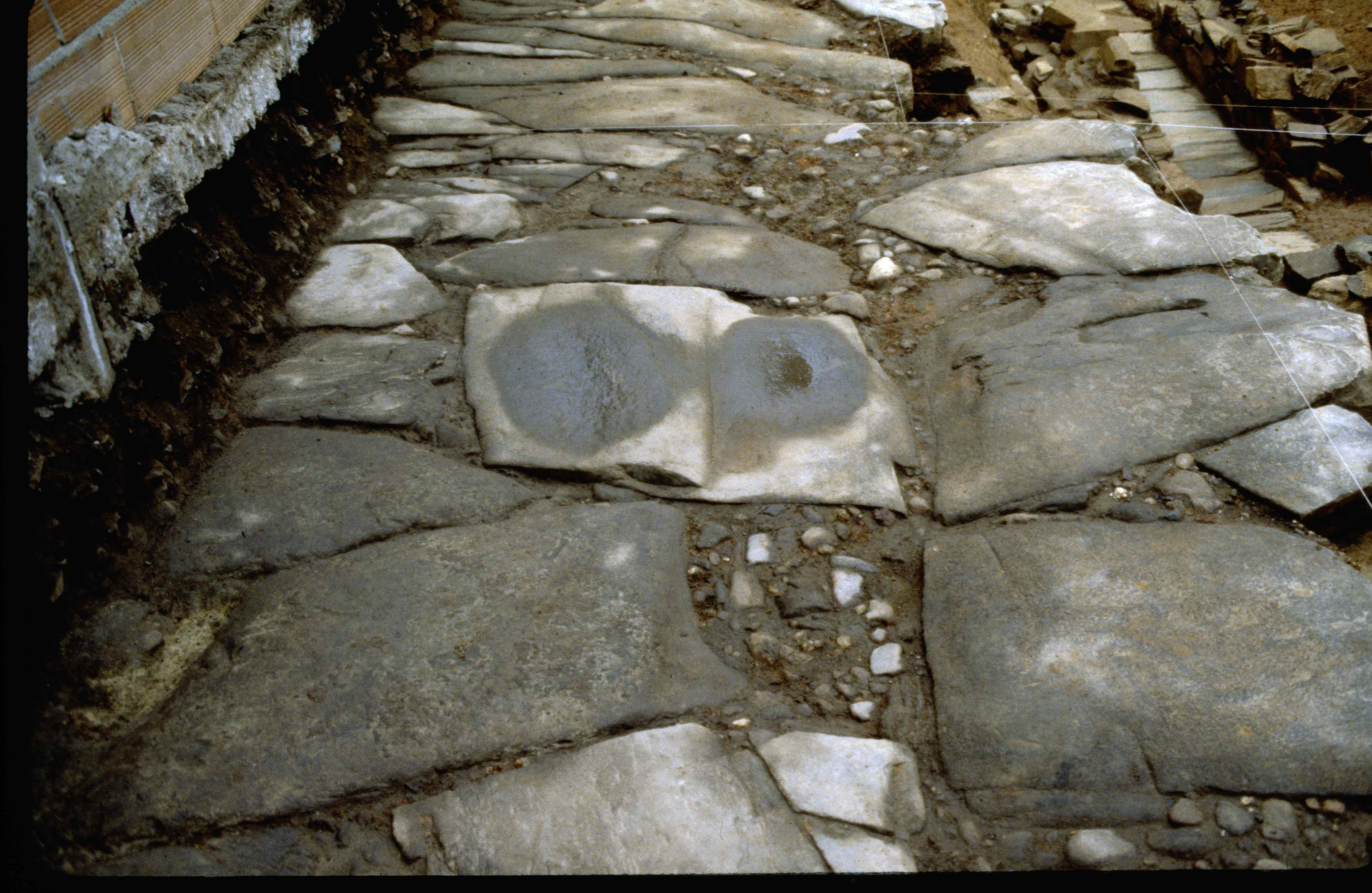 Cardo Maximo. Excavación realizada en Astorga (León, España). Foto por V. García Marcos. Museo Romano de Astorga.